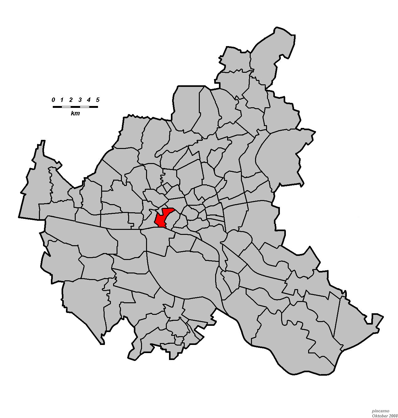 Hamburg: Stadtteil Hamburg-St. Pauli